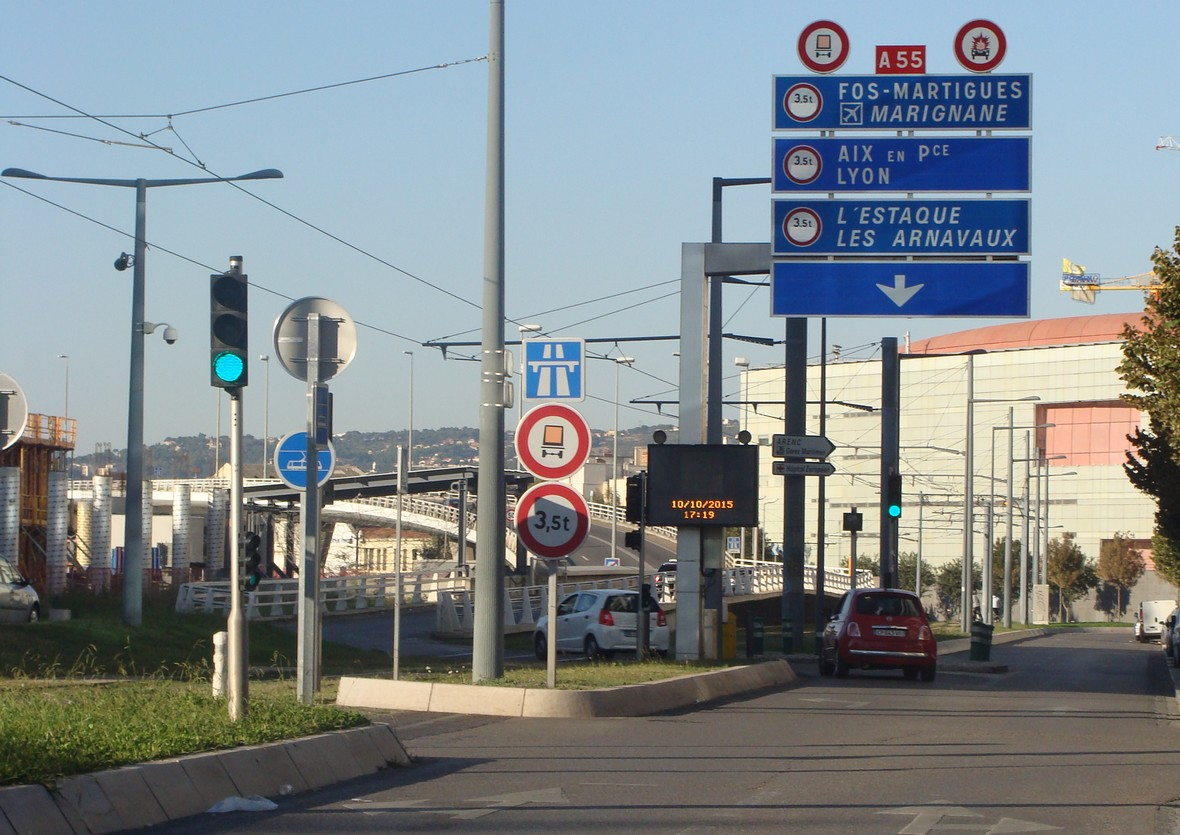 La chicane d'accès à l'Autoroute du Littoral (A 55) par le viaduc de Storlone, depuis le boulevard de Dunkerque dans le quartier de la Joliette (2e arrondissement de Marseille) : la voiture rouge et la blanche s'engagent vers le viaduc, en traversant la voie du tram par un double virage serré, juste avant de fusionner avec le trafic venant du tunnel du Vieux-Port et sortant du tunnel de la Major.